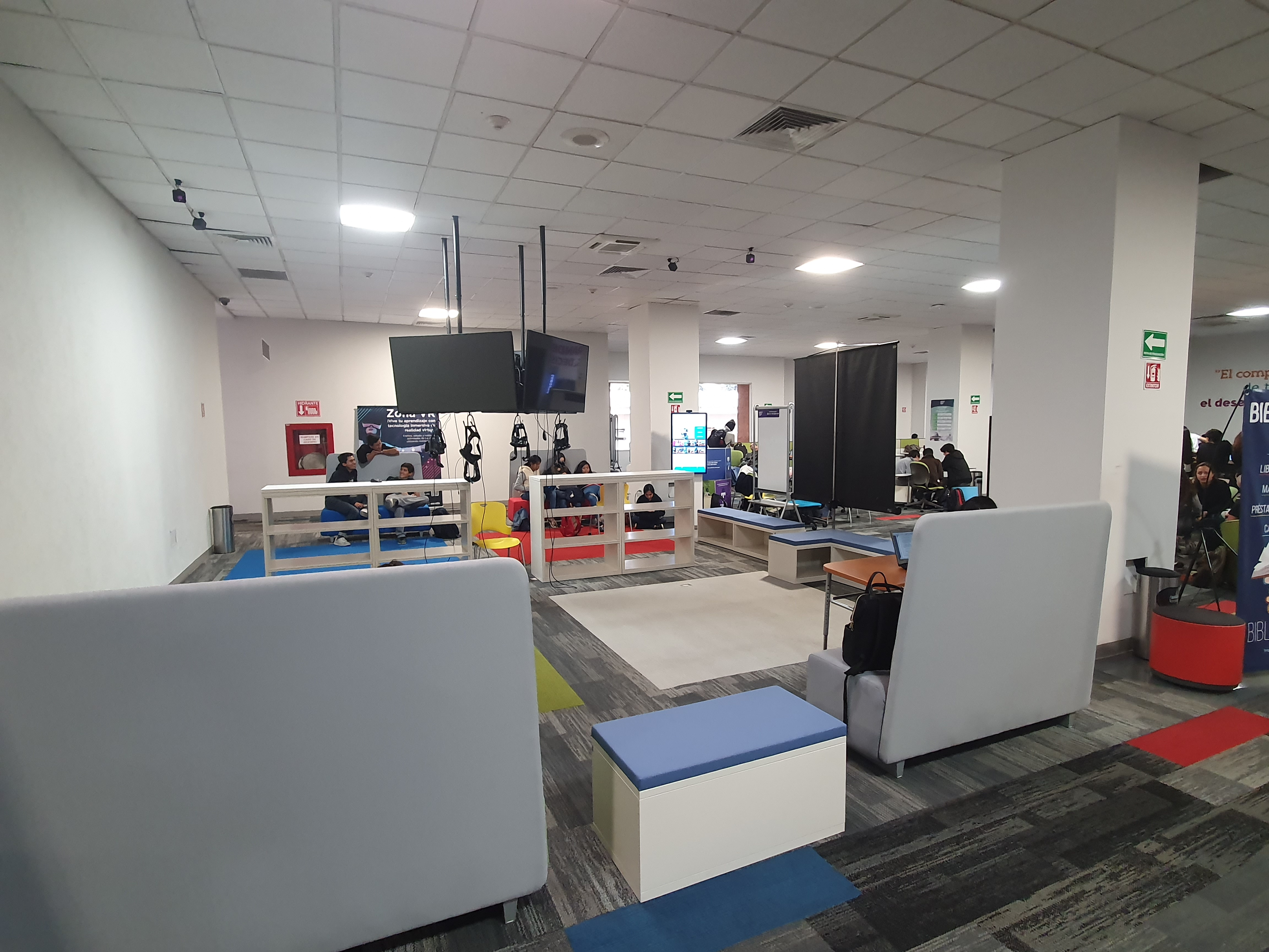 Zona VR esta ubicada en el learning commons planta baja, es una zona donde puedes probar la experiancia de usar los lentes de realidad virtual "VR".